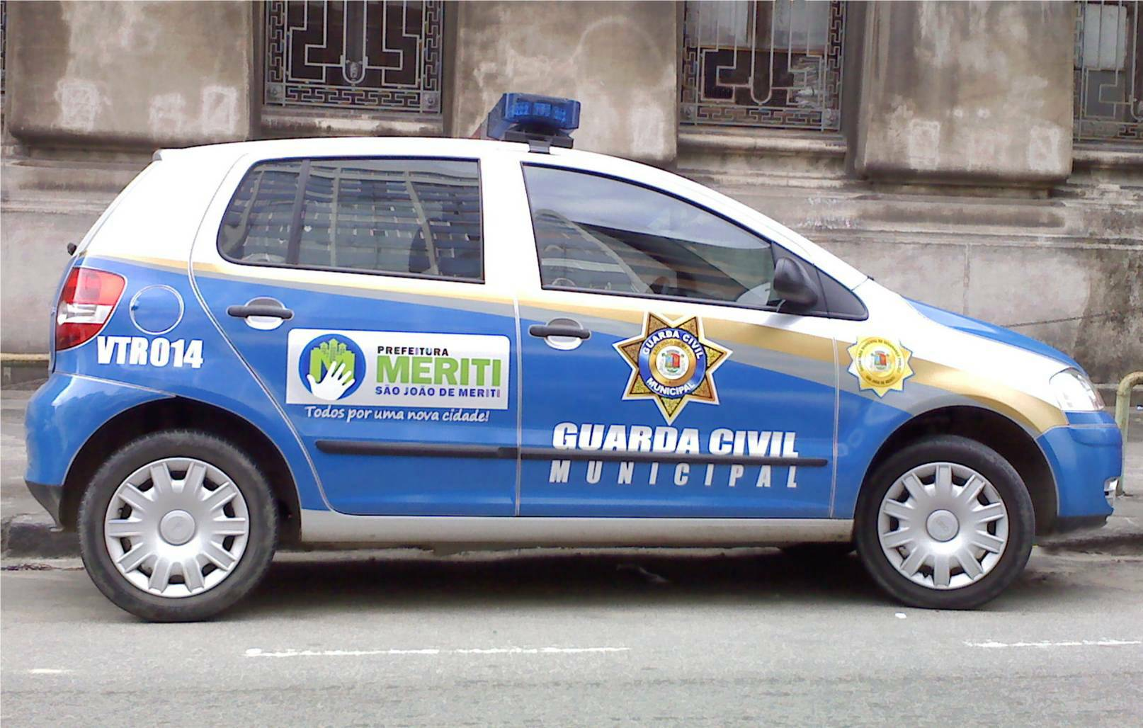 police car - São João de Merití - Brazil